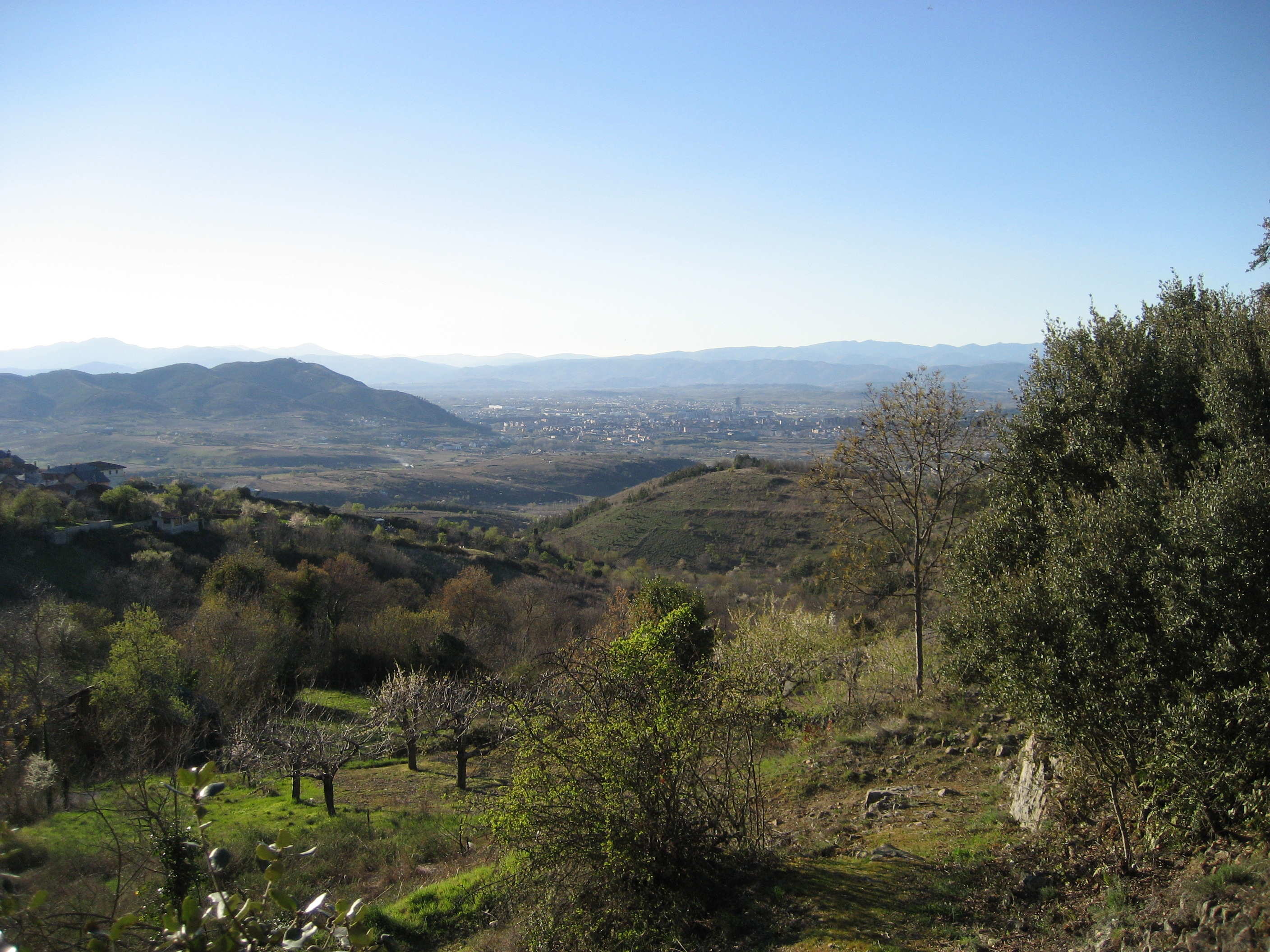 Vista de la ciudad de Ponferrada y de parte de la comarca del Bierzo Bajo desde el pueblo de Lombillo de Los Barrios (Municipio de Ponferrada)